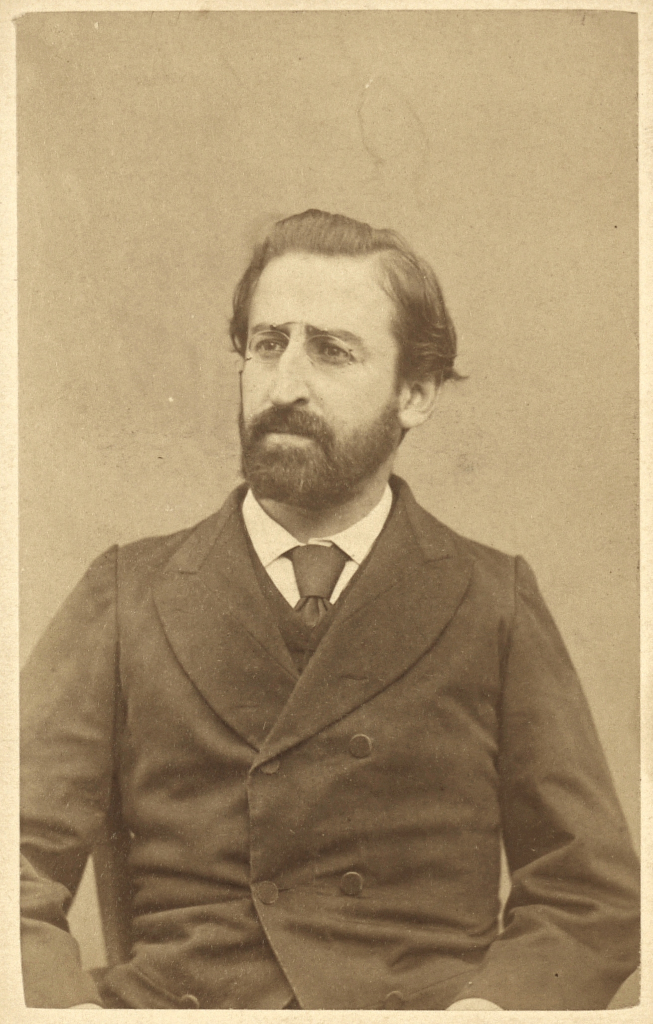 Théophile Ferré photographié par Eugène Appert.